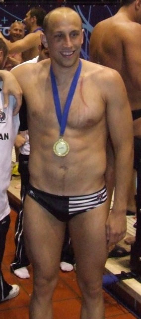 Фајнал-фор Рим 2011: Ватерполисти Партиѕана Стефан Митровић (лево) и Андрија Прлаиновић (десно) са кондиционим тренером Владимиром Павловићем после освојене титуле првака Европе.